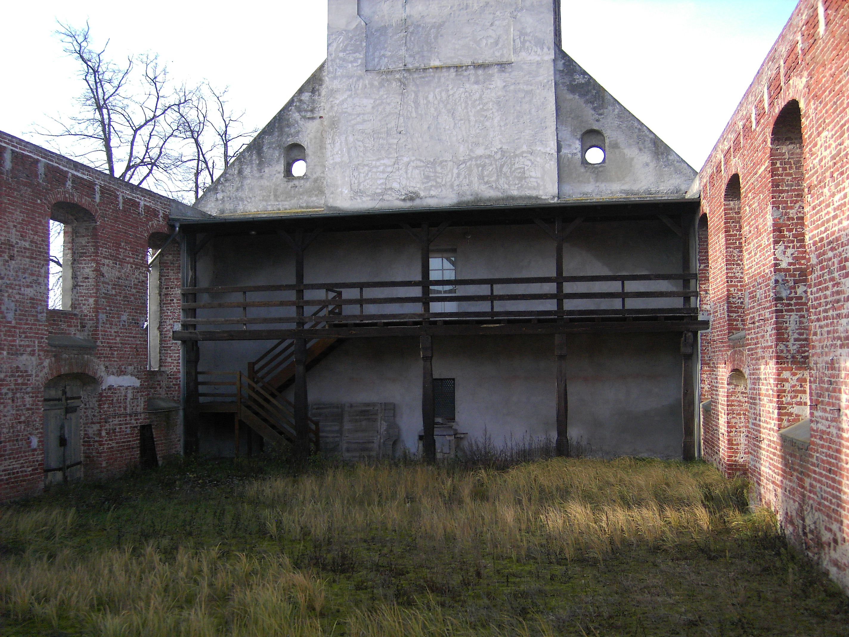 Dorfkirche Zabakuck, Blick in den Innenraum auf den Turm und die neue Empore